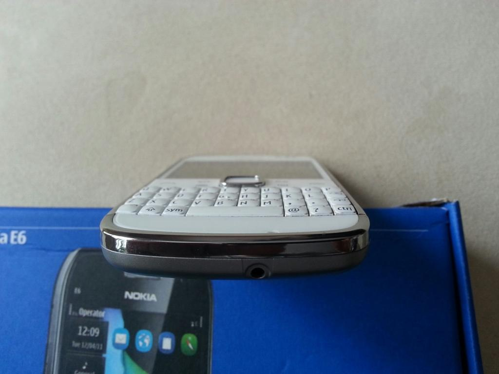 Nokia E6 Biała dól telefonu